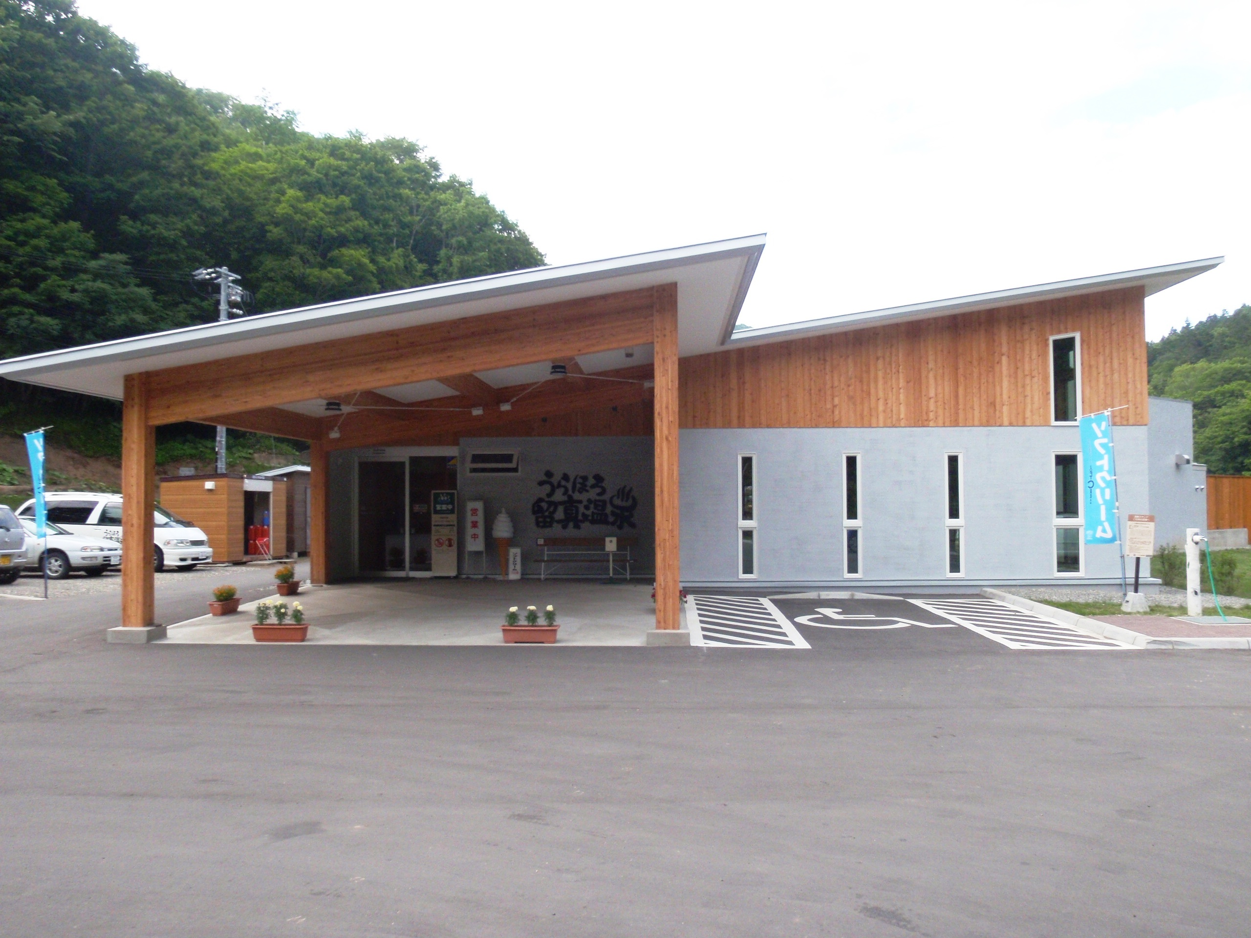 うらほろ留真温泉